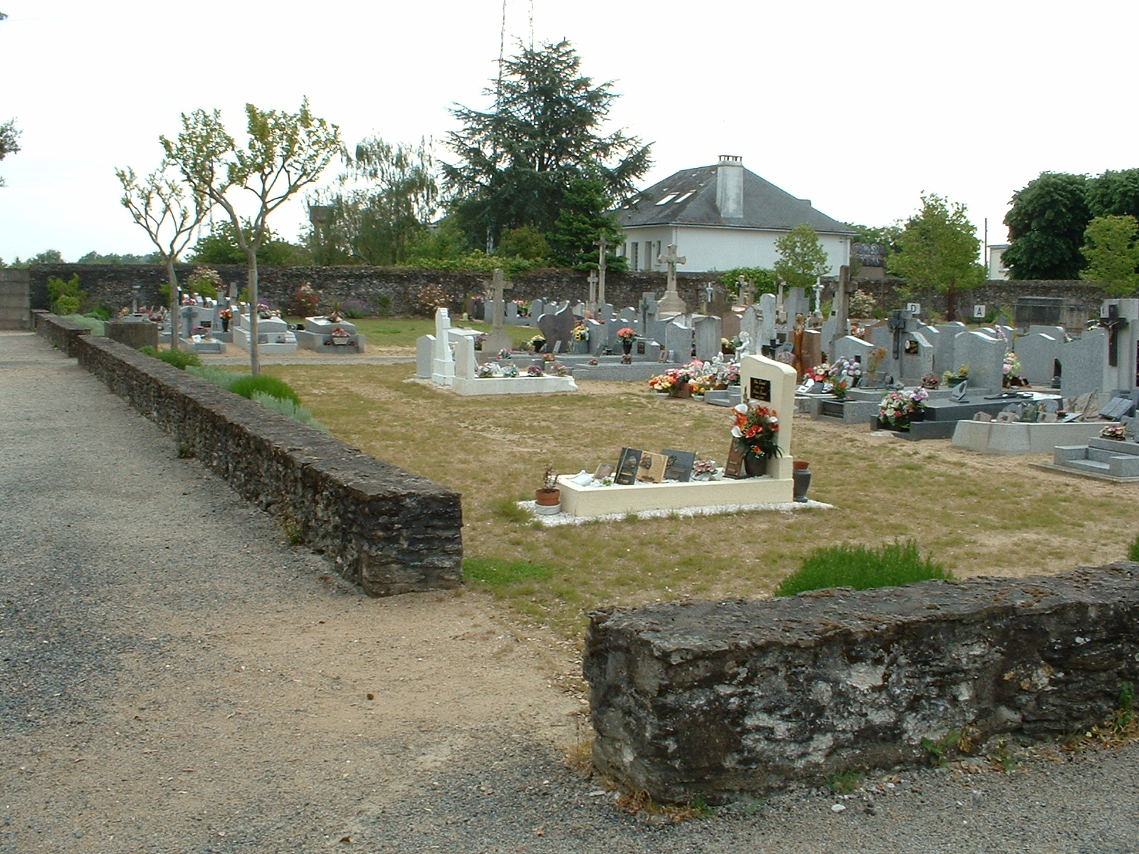 Nantes (France) - Cimetière du Vieux-Doulon (4)